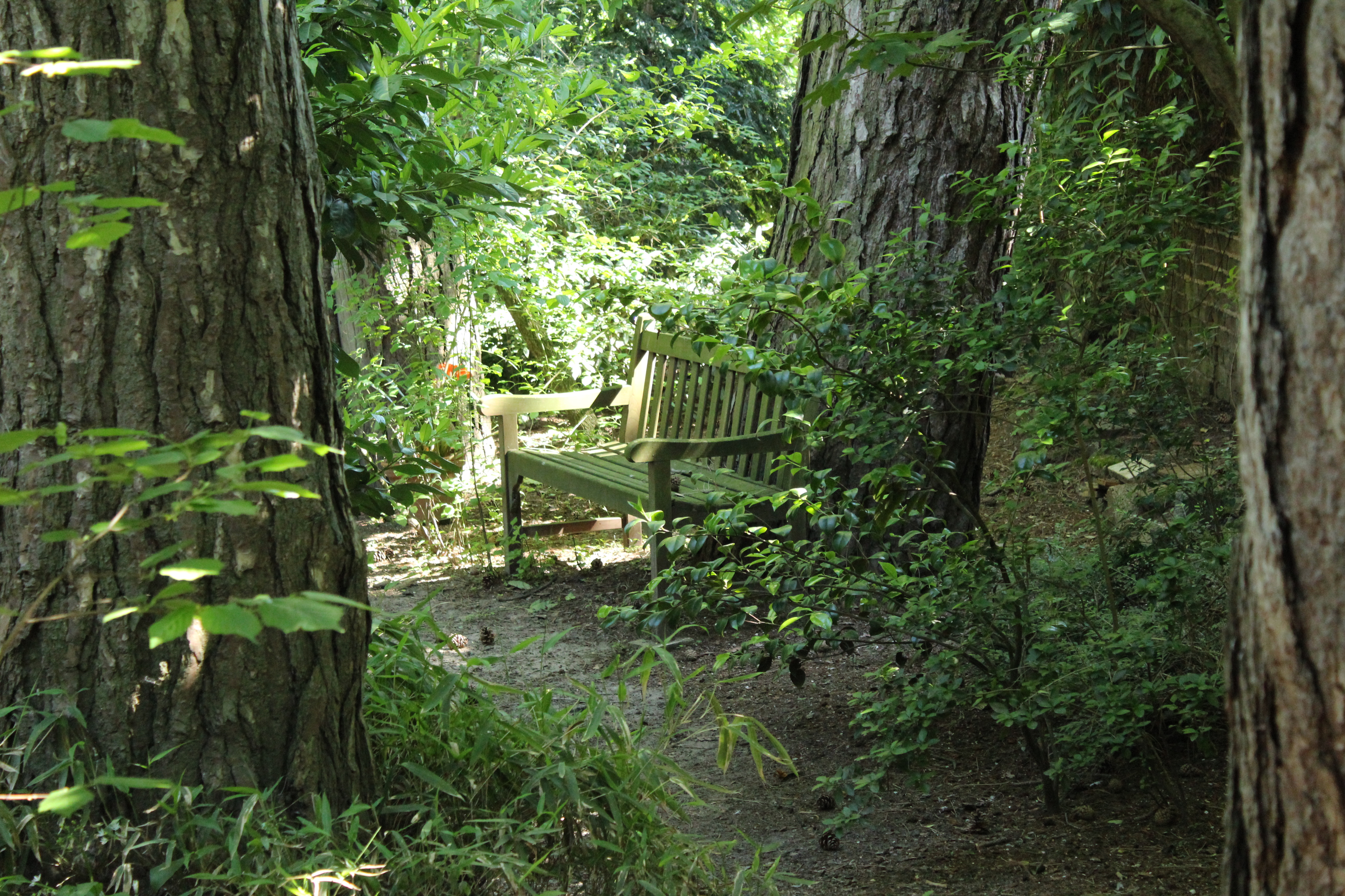 Fouillis de végétation